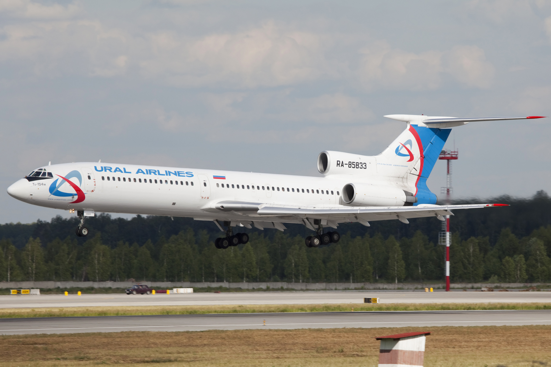 Moskou-Domodedovo